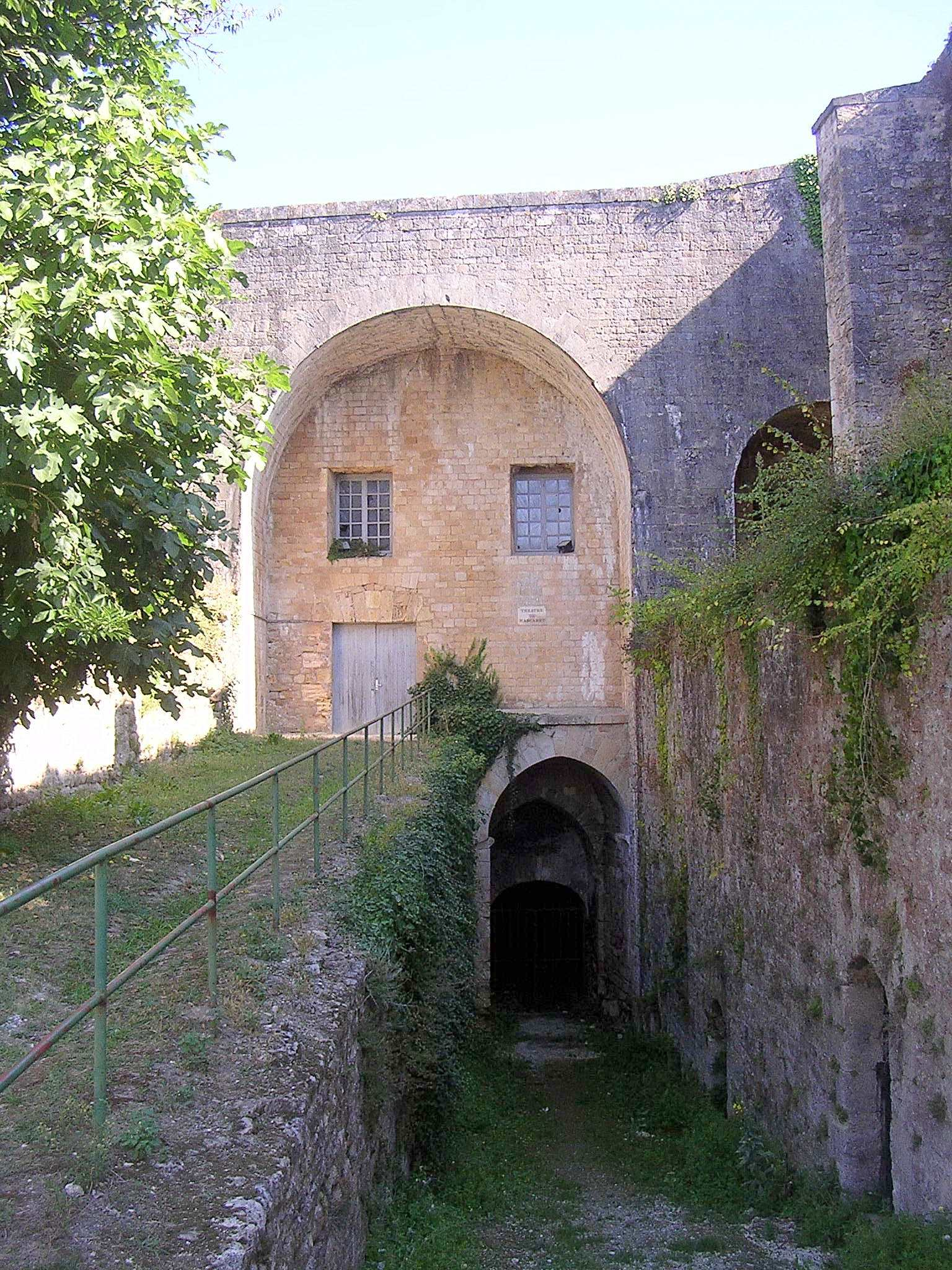 Citadelle de Blaye, hôpital du siège (partie basse) et théâtre du mascaret (partie haute)